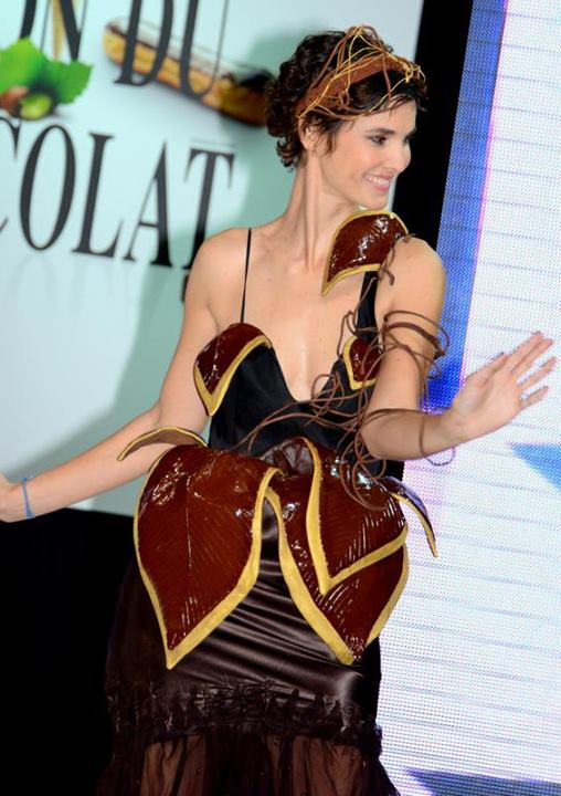 Eglantine Emeyé au défilé de mode du salon du chocolat.